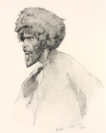 Lezgin (plemeni Asakho).